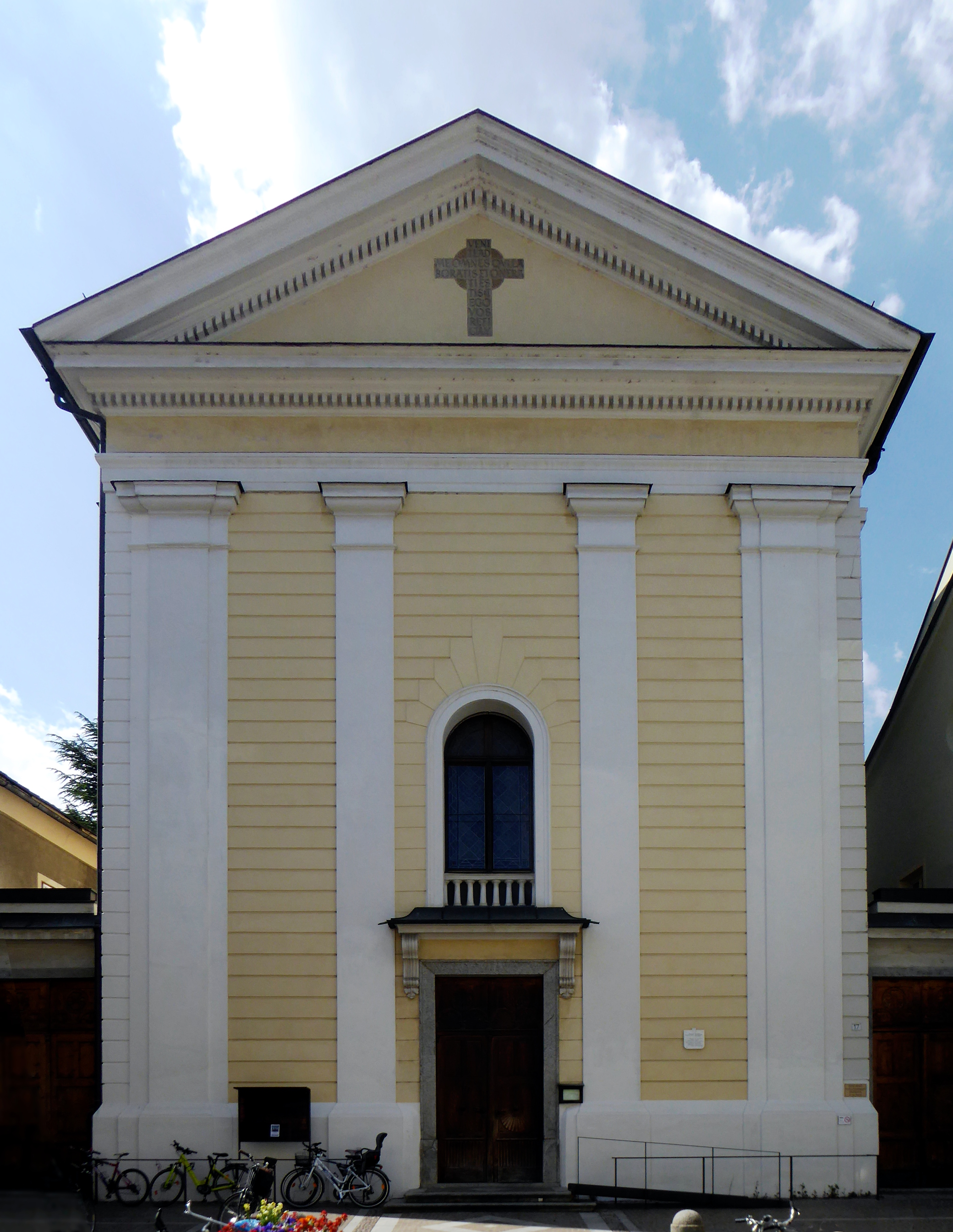 Brixen, Ostseite der Kirche der Congregatio Jesu, dem heiligen Josef geweiht.